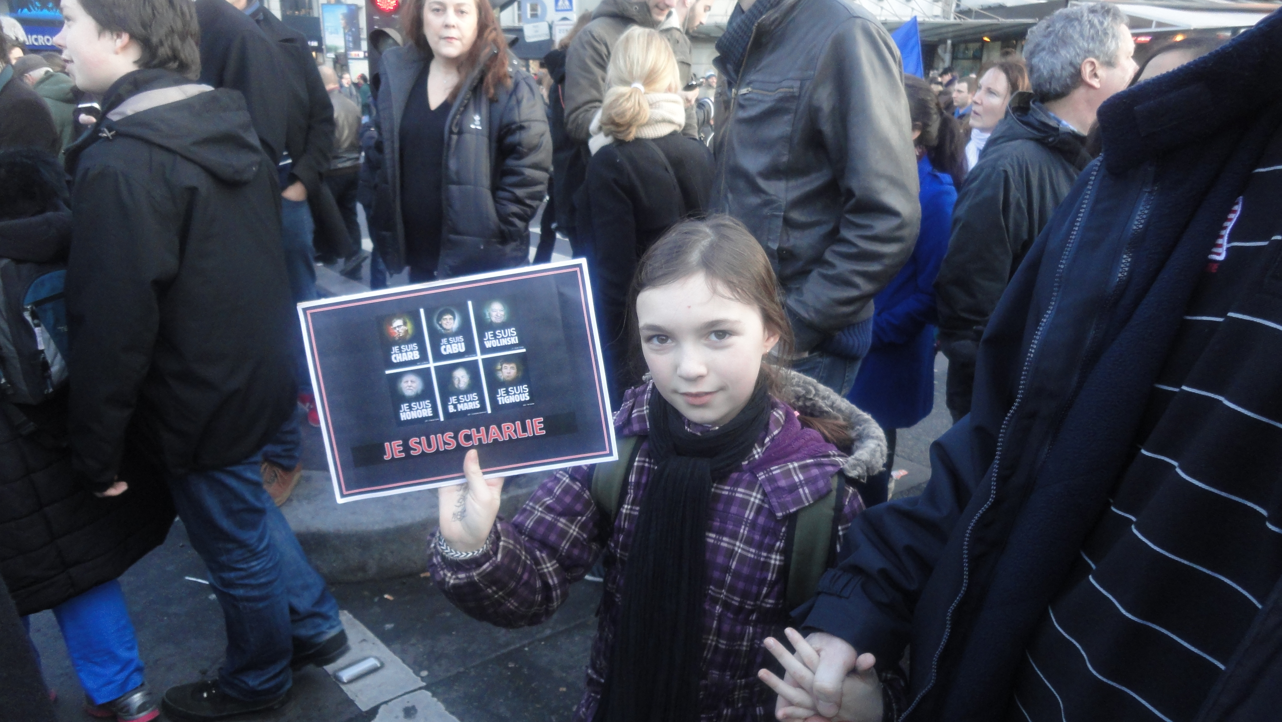 Je Suis Charlie 20150111 Paris Anonymes